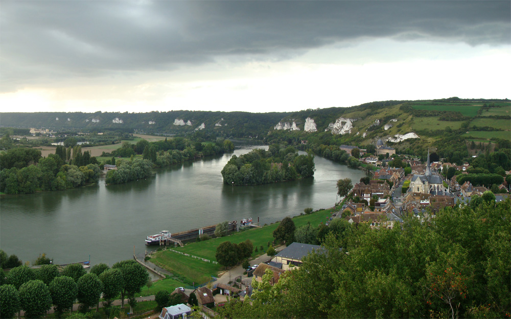 La Seine (île du Château), Les Andelys, Eure, Normandie, France.